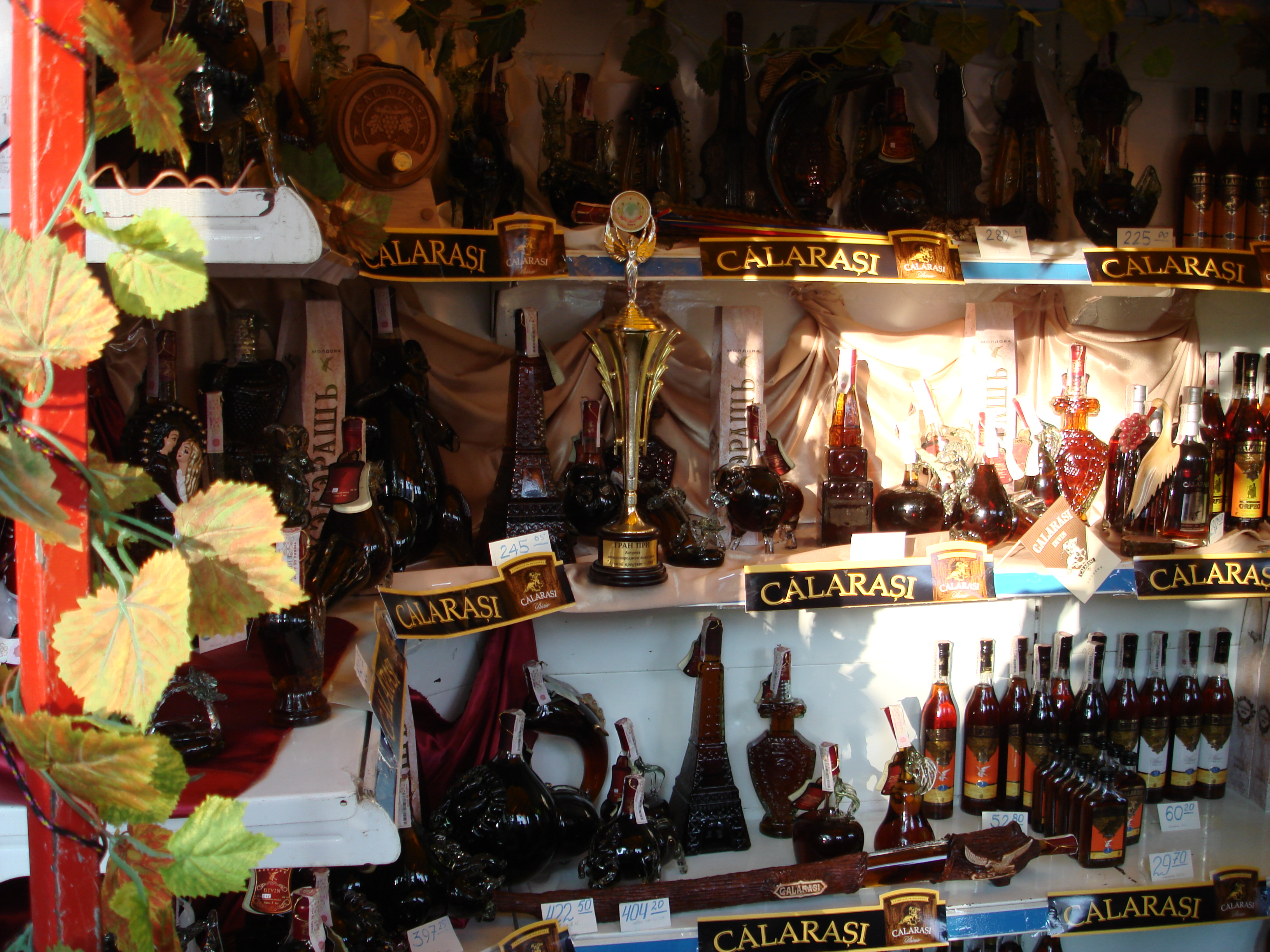 Один из стендов во время Национального дня вина (Кишинёв, Молдавия, 2006 год)